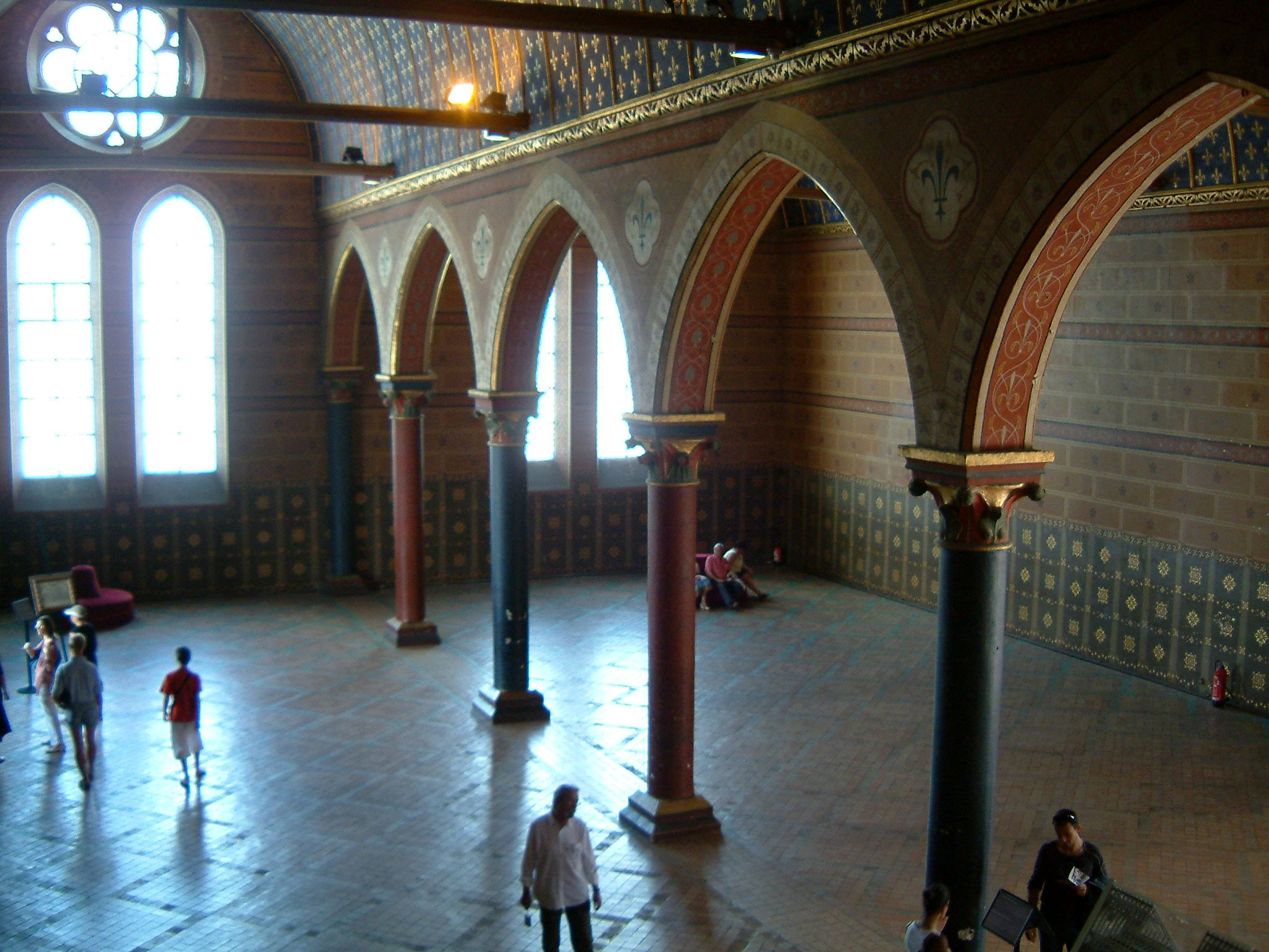 Salle des Etats, intérieur du Château de Blois, Blois, FRANCE